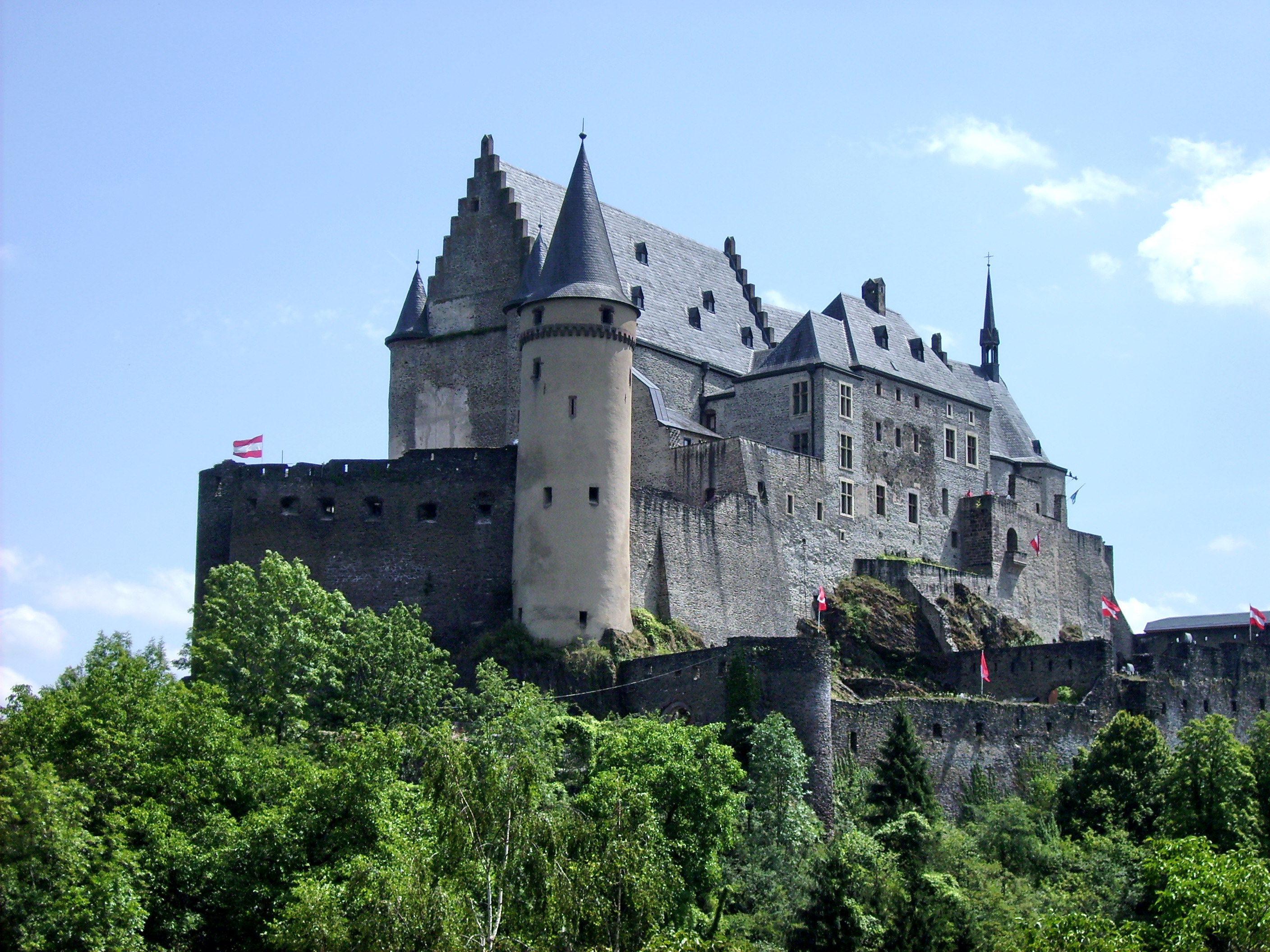 Het kasteel Vianden (Vianden, Luxemburg), Le Château Vianden (Vianden, Luxembourg)